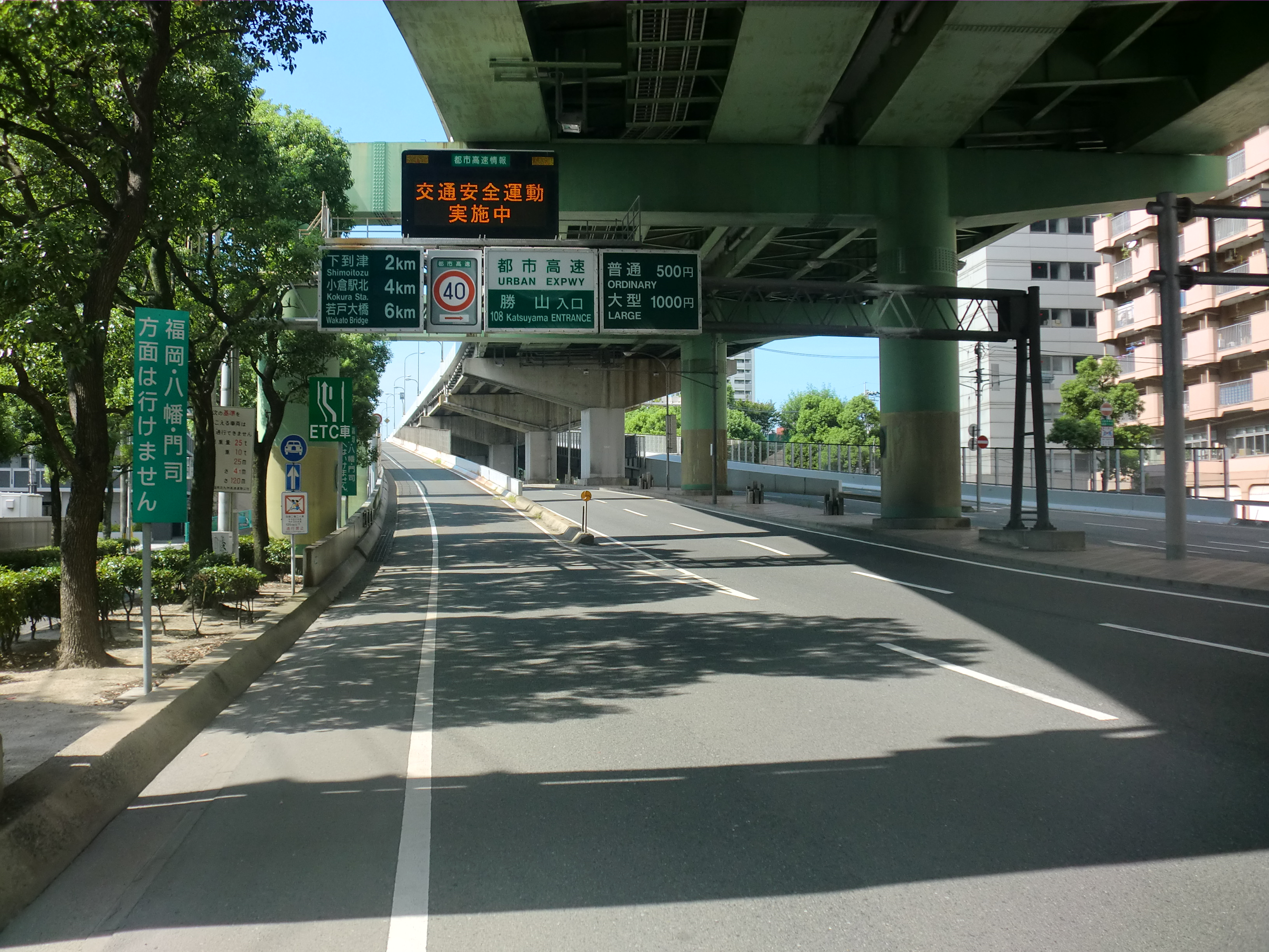 北九州都市高速道路1号線勝山（かつやま）ランプ（入口）